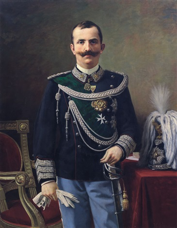 Ritratto del Re Vittorio Rmanuele III, by Pier Celestino Gilardi